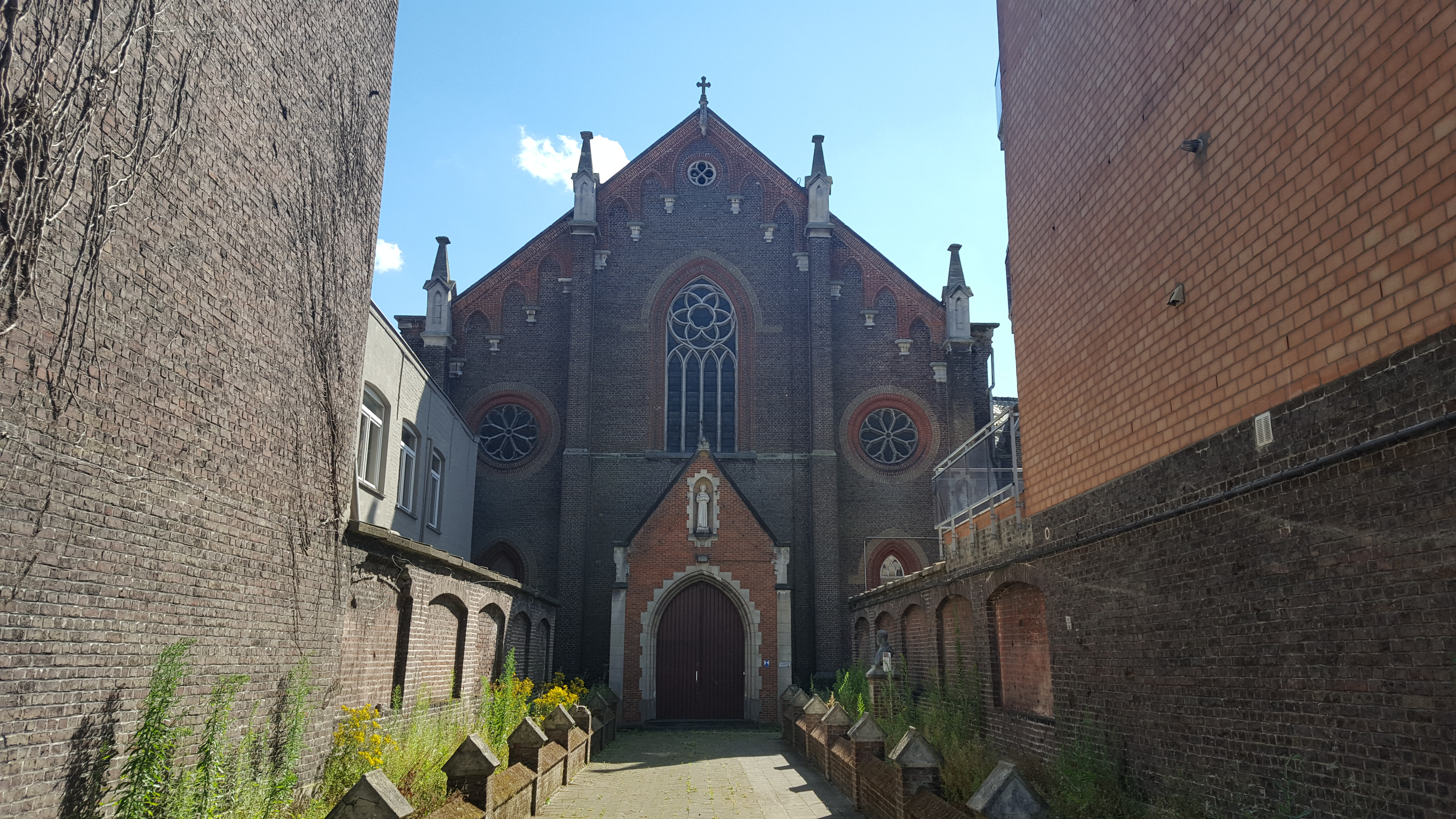 Paterskerk, Eeklo, België